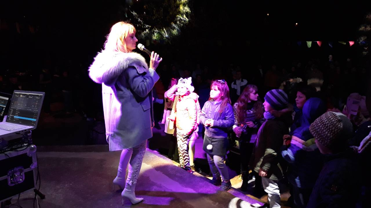 Dobrogea- Hram 2018